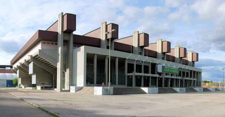 Foto de la fachada principal del pabelón Caja Madrid